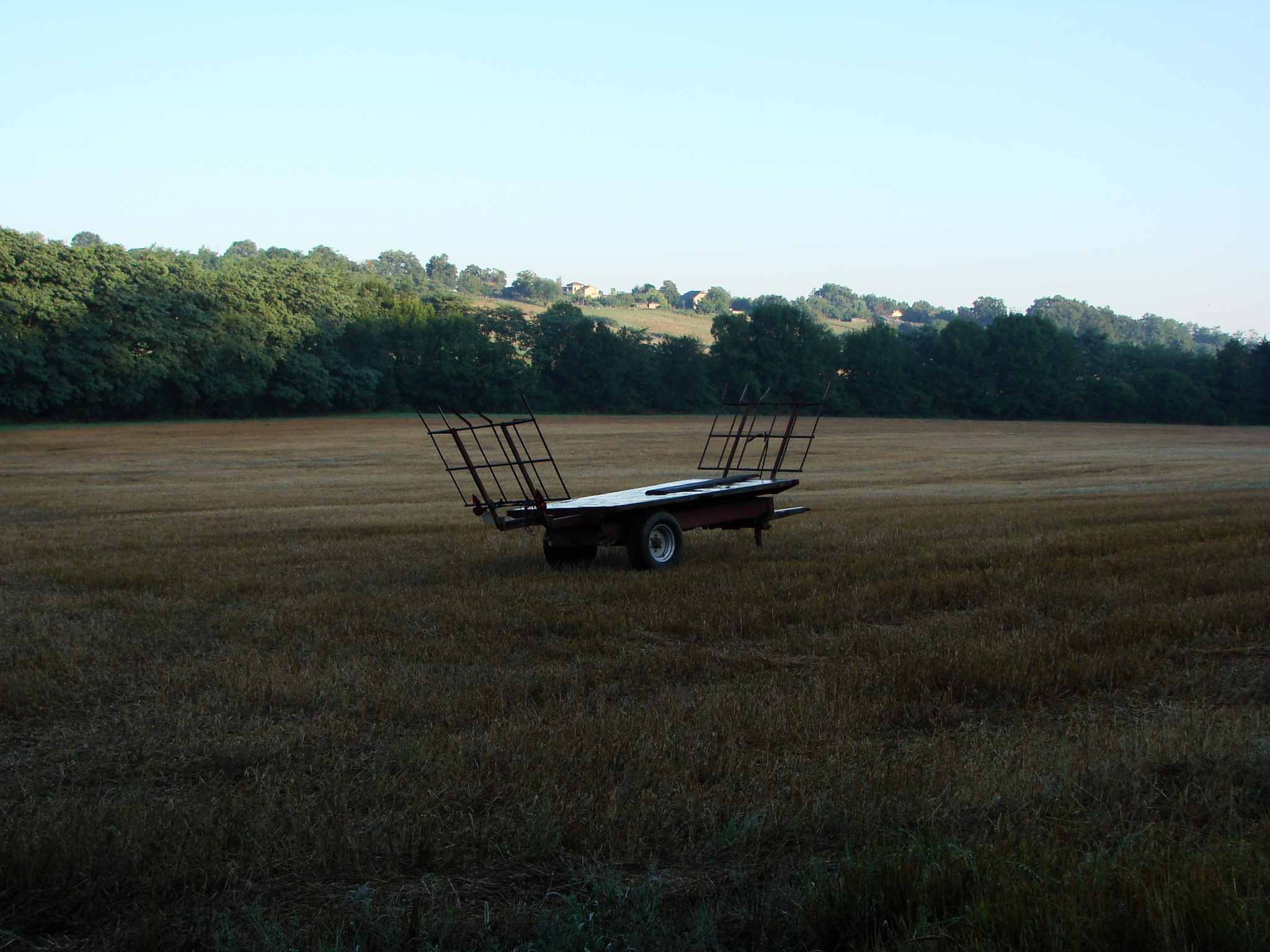 Vue du village de Dours dans les Hautes-Pyrénées (France) : Champs avec vue du village en fond sur la colline (vallée de la rivière Loulès)